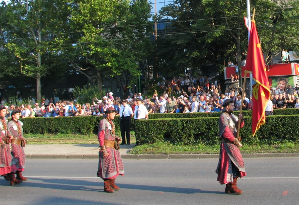 Domagojevi strijelci na svečanom mimohodu u Zagrebu, 4. kolovoza 2015.